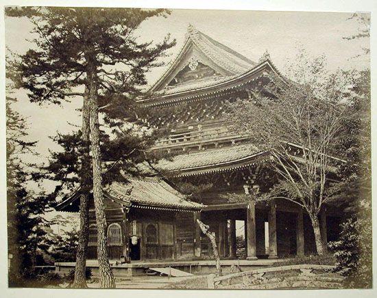 Der Chion-in-Tempel in Kyōto in der 2. Hälfte des 19. Jahrhunderts